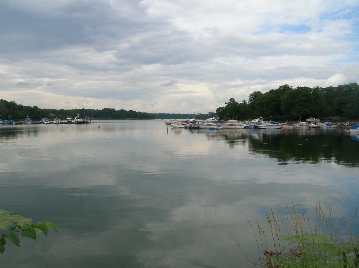 Brunnsviken, Stockholm, Sweden.